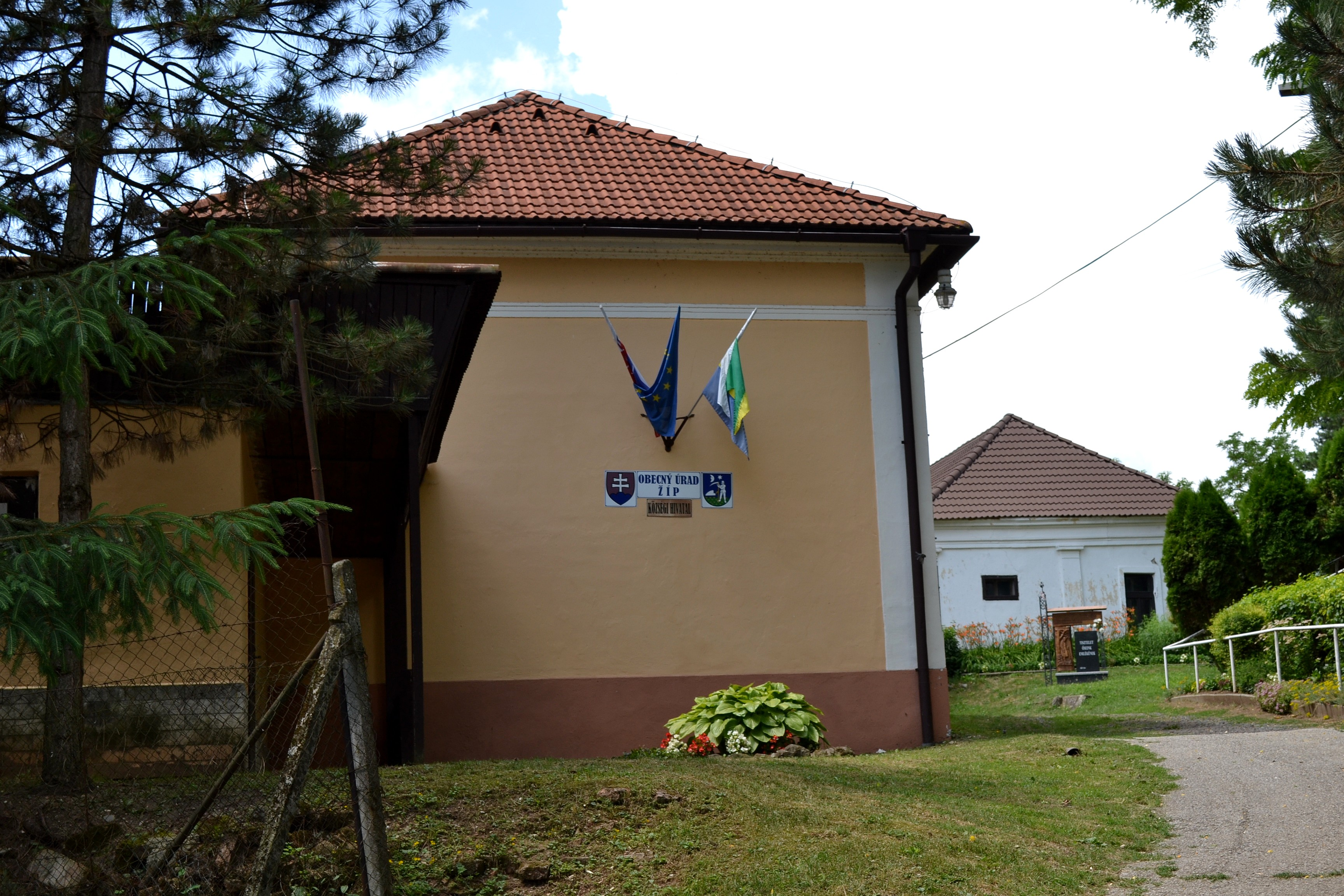 Žíp (okr. Rimavská Sobota), kostol Reformovanej kresťanskej cirkvi; budova obecného úradu